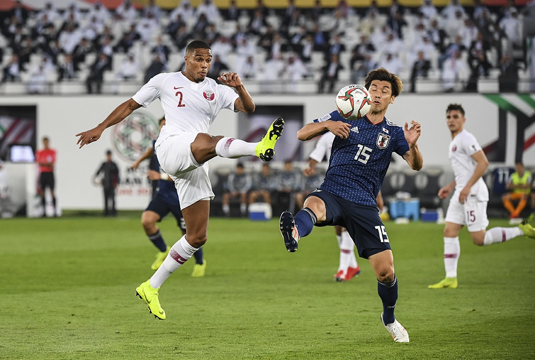 دیدار فینال جام ملت‌های 2019 آسیا بین تیم ملی فوتبال قطر و ژاپن بعدظهر جمعه 12 بهمن در ورزشگاه زاید به قضاوت روشن ایرماتوف ازبکستانی برگزار شد.المعزعلی در دقیقه 12 و عبدالعزیر حاتم 27 و اکرم عفیف در دقیقه 83 با ضربه پنالتی برای قطر گلزنی کردند.برای ژاپن مینامینو 69 موفق به گشودن دروازه قطر شدند.